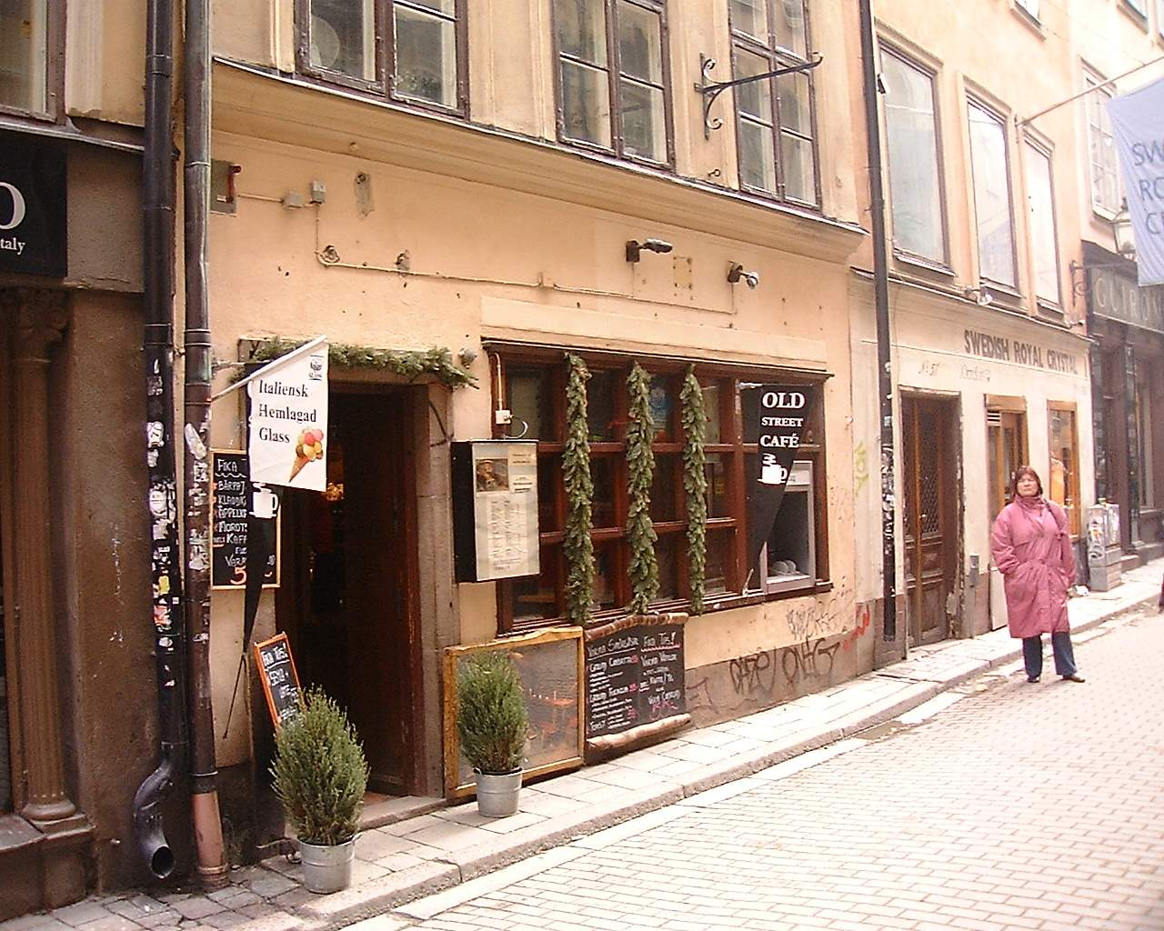 Front of 49, Västerlånggatan. Gamla stan, Stockholm.